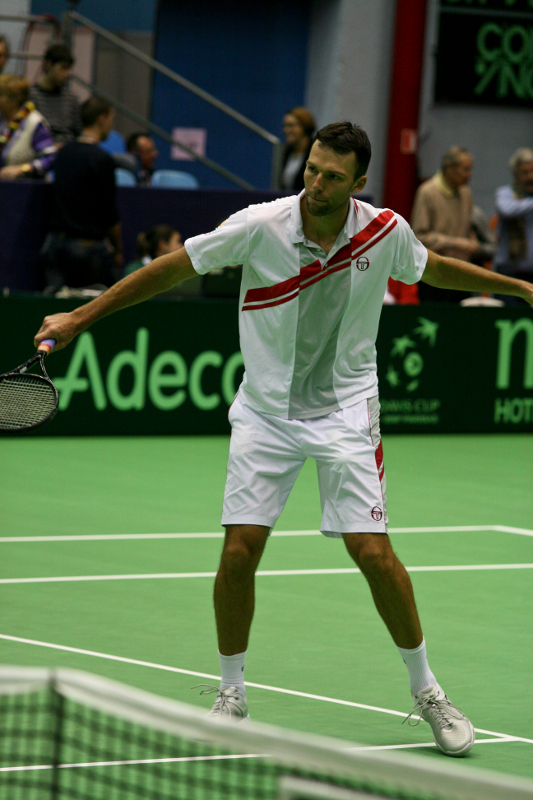 Davisov kup 2011. u Zagrebu